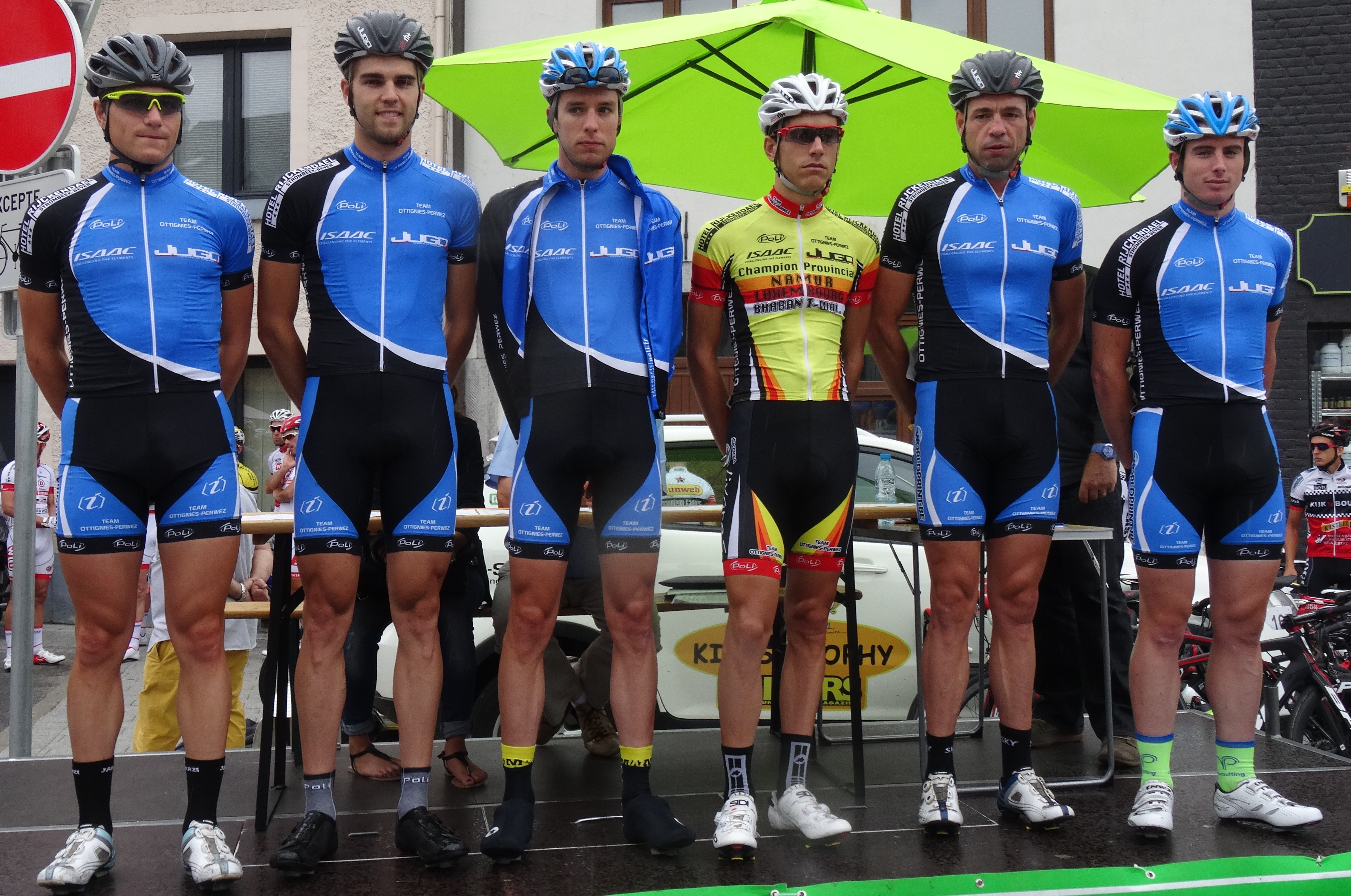 Reportage photographique réalisé le mercredi 6 août à l'occasion du départ de la première étape du Tour de la province de Namur 2014 à Jambes (Namur), Belgique.